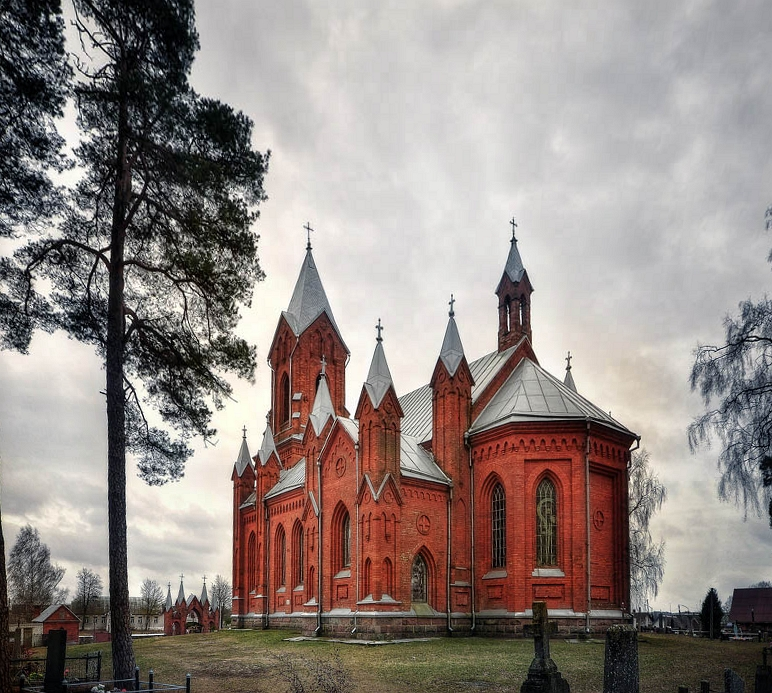 Беларуская (тарашкевіца): Аляксееўскі касьцёл. г. п. Івянец